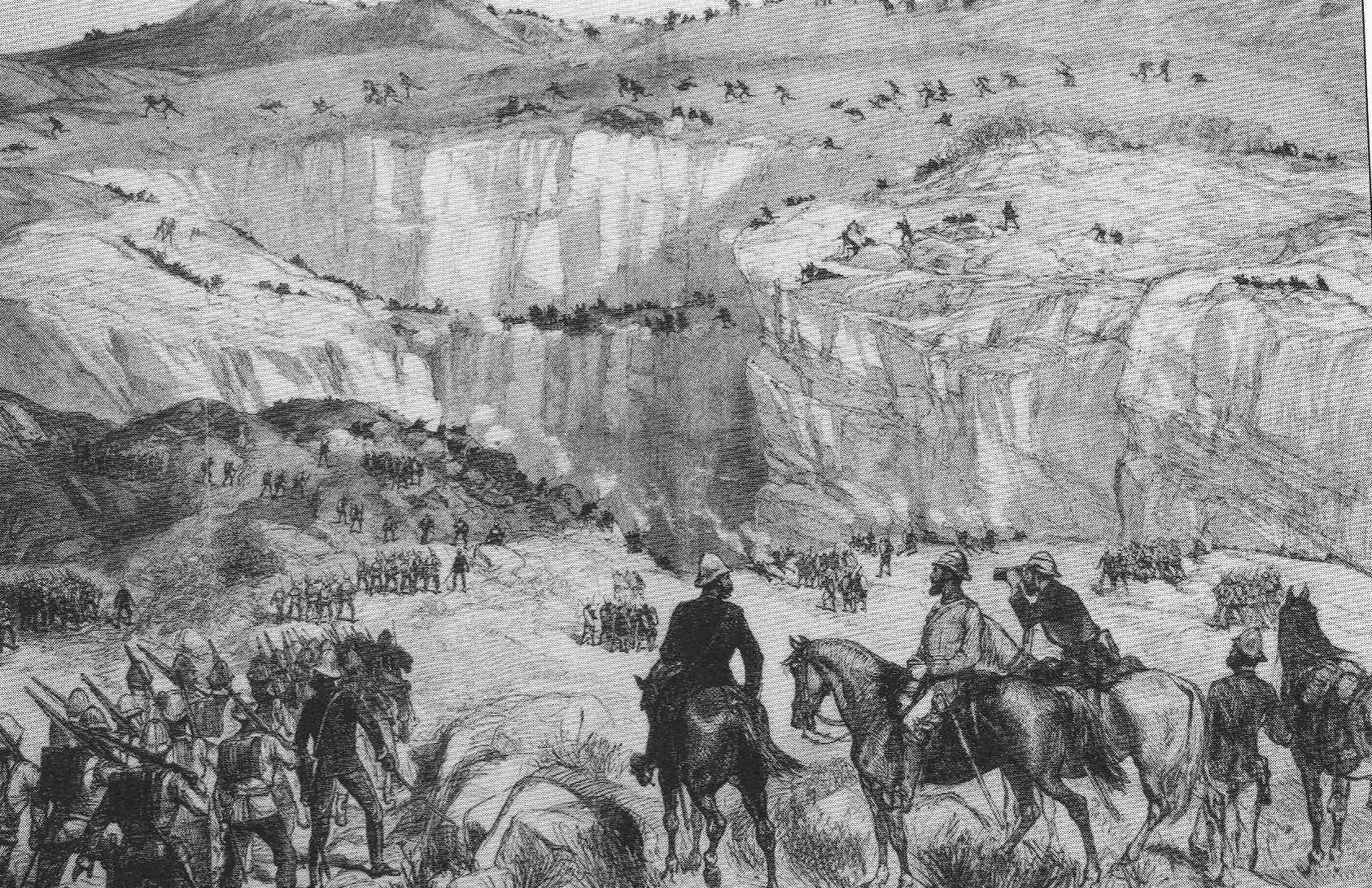 Escarmouche de la vallée de la Batsche. 12 janvier 1879. Chelmsford et son état-major observe la progression des troupes britanniques contre les positions zouloues. Gravure de 1879 environ.